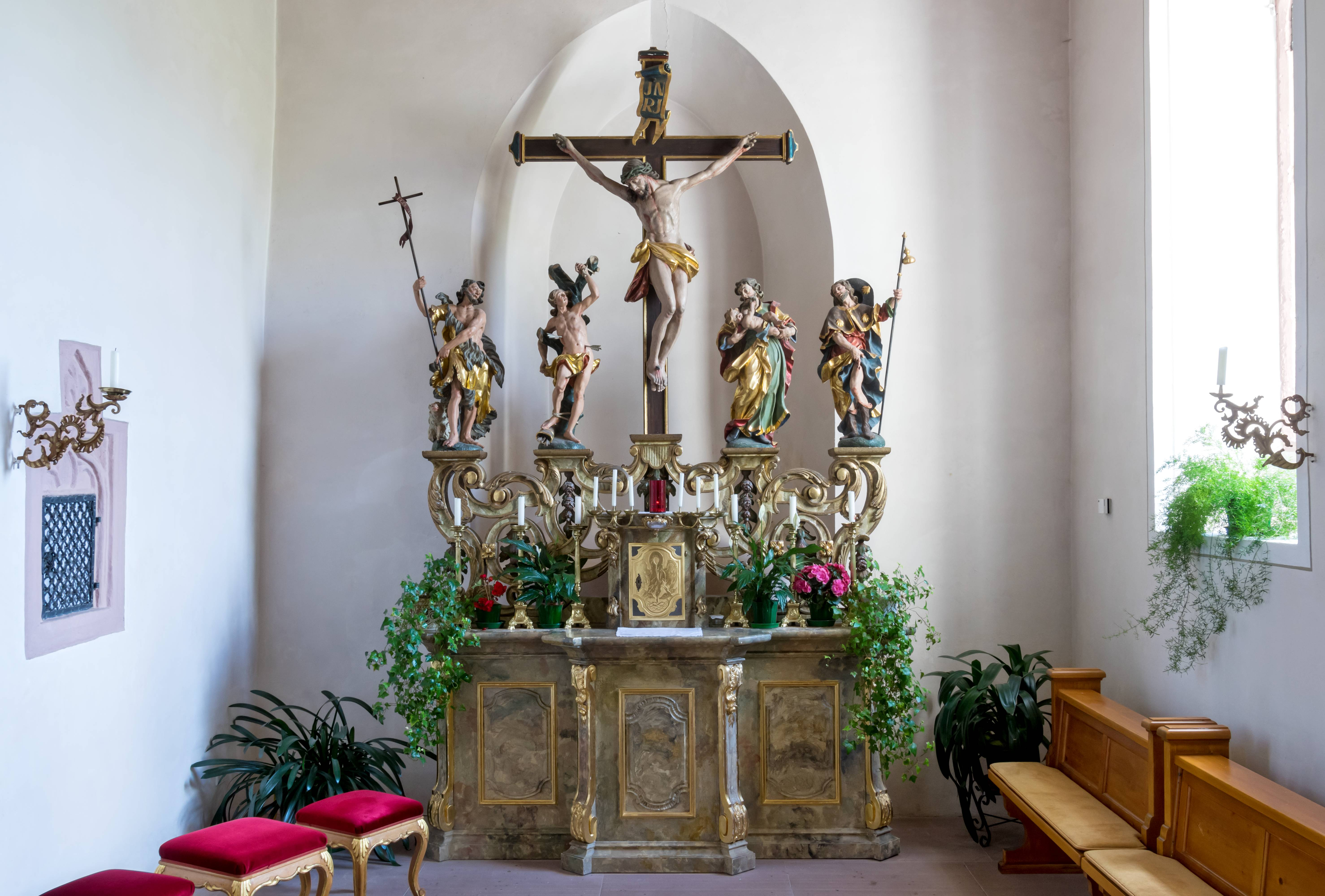 St. Andreas in Furtwangen Neukirch Der Hauptaltar